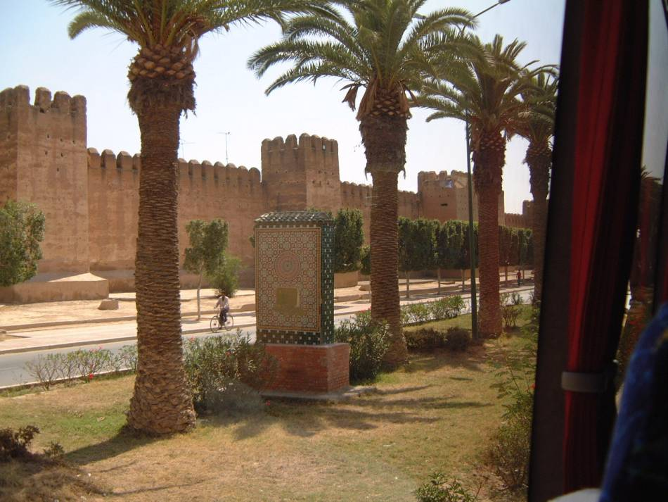 Murailles de Taroudant vers Agadir au Maroc